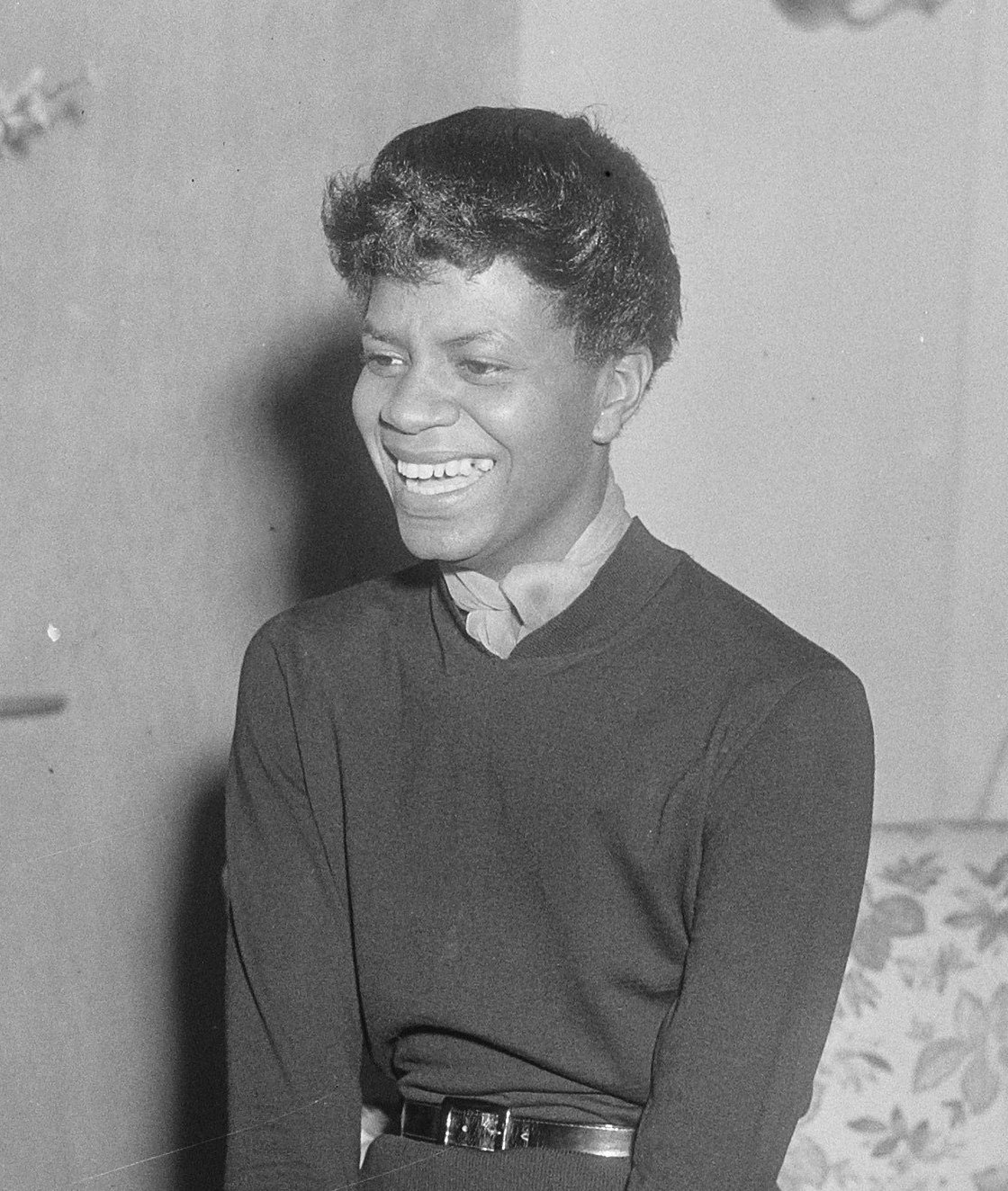 Zangeres Enid Mosier in Amsterdam